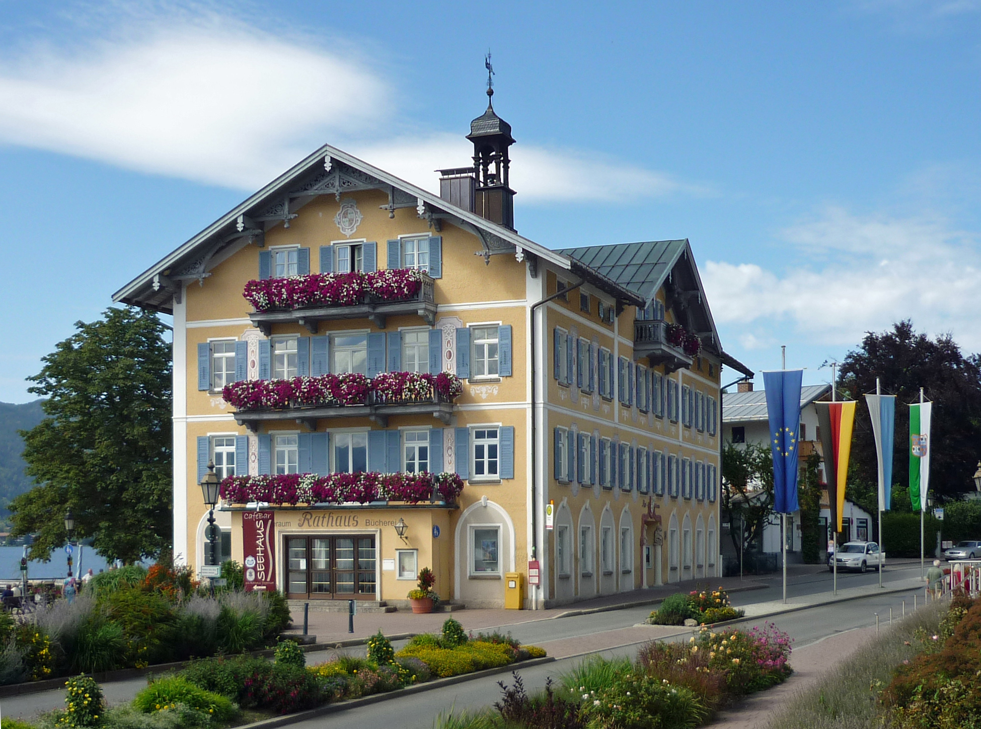 Rathaus in TegernseeThis is a photograph of an architectural monument.